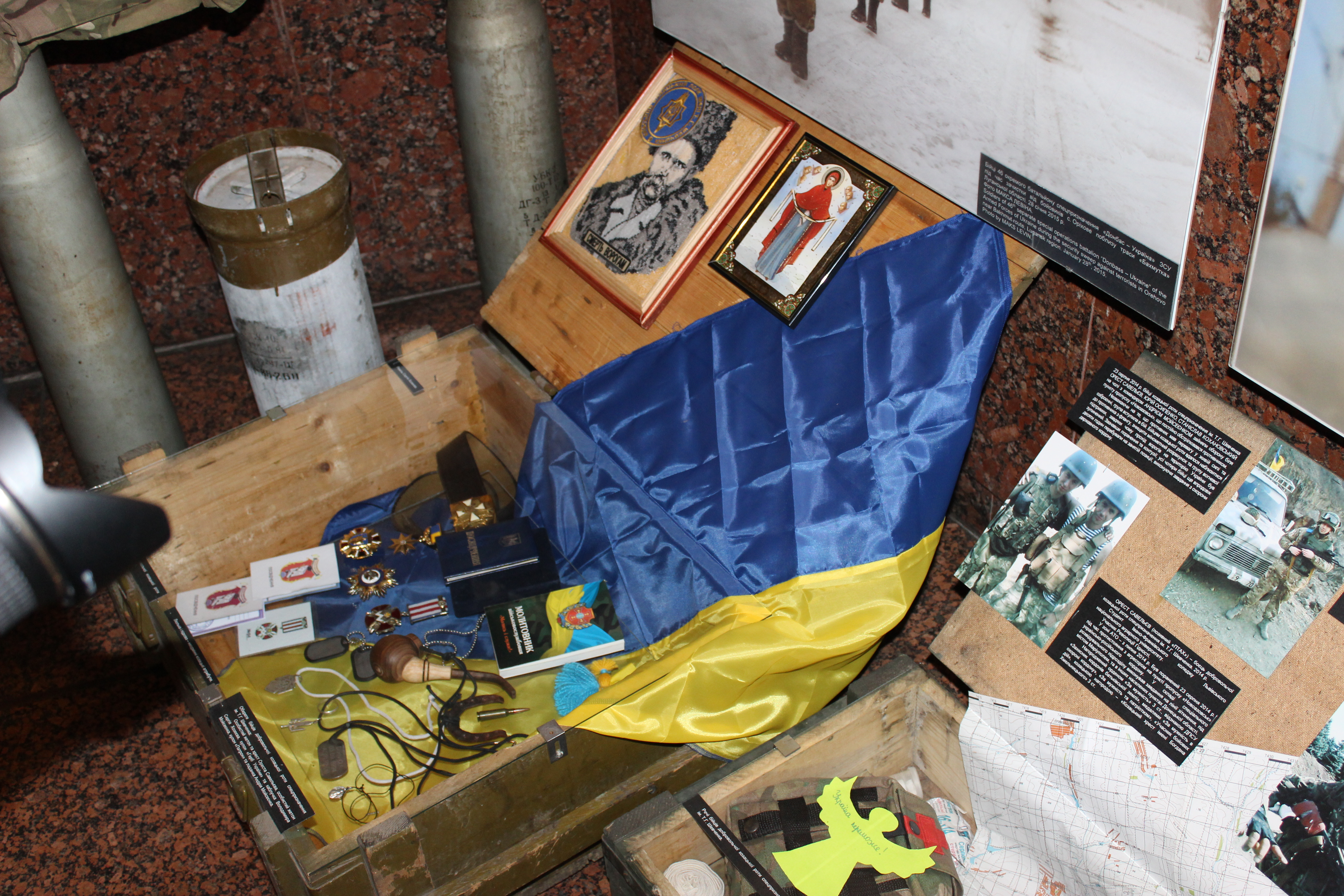 Виставка "Бойове українське козацтво в АТО" присвячена козацькій роті ім. Т.Шевченка БУК.